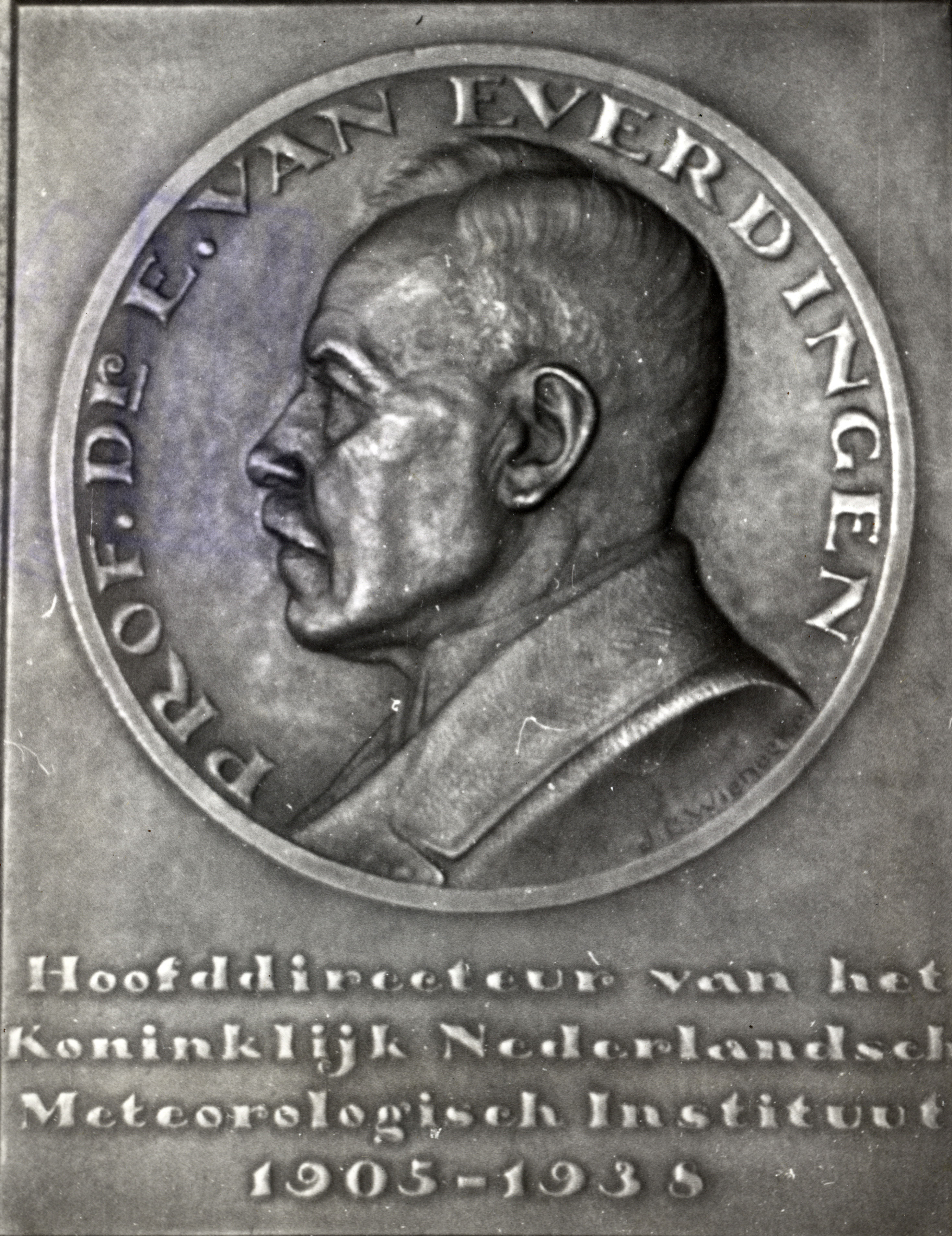 Portret van professor E. van Everdingen, geboren 1873, buitengewoon hoogleraar in de natuurkunde aan de Utrechtse hogeschool (1910-1943), hoofddirecteur van het K.N.M.I. (1905-1938), overleden 1955. Borstbeeld links, in cirkel, op een plaquette gemaakt door J.C. Wienecke.